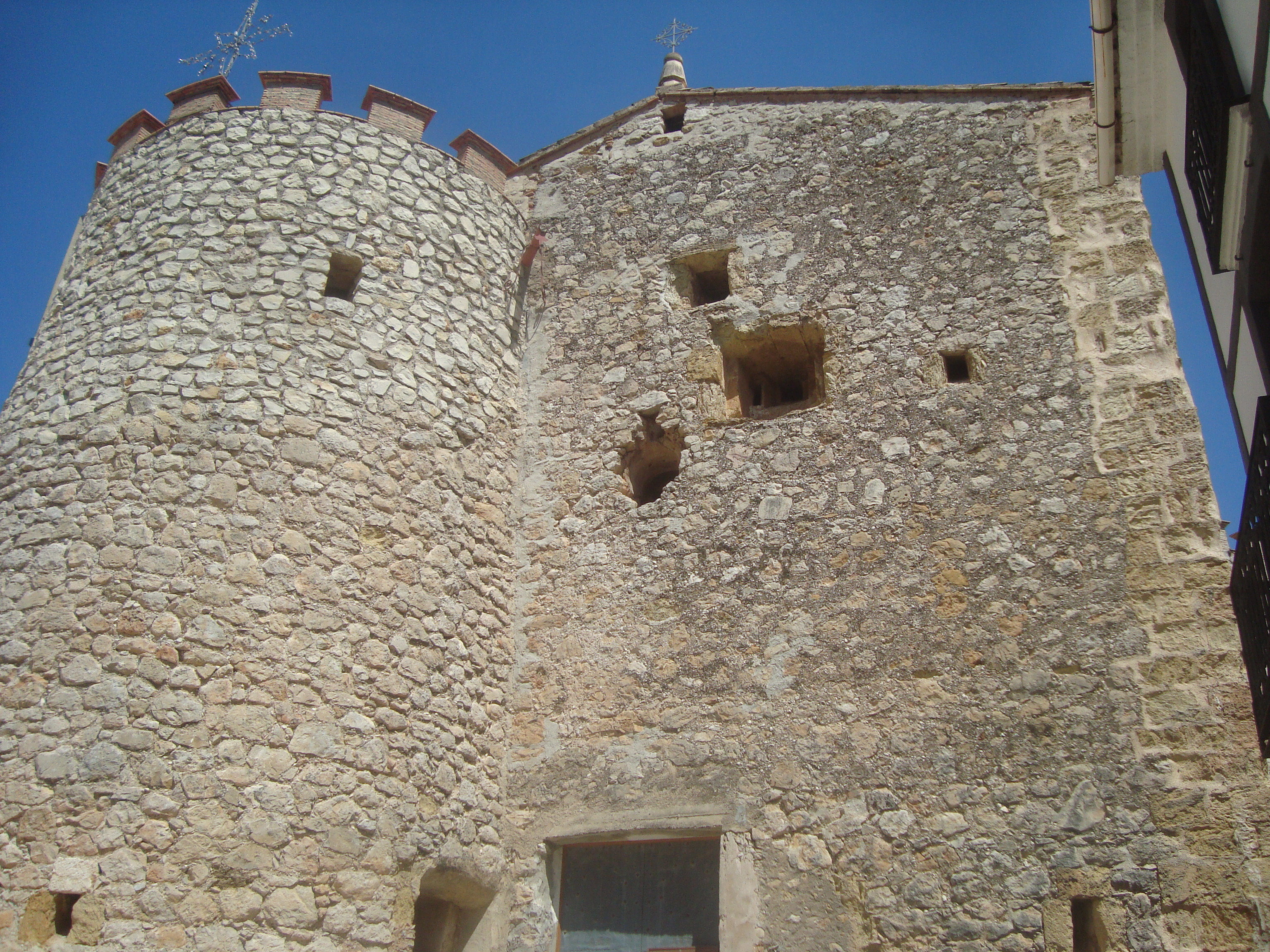 Castell-Església parroquial de Sant Miquel Arcàngel (Murla)